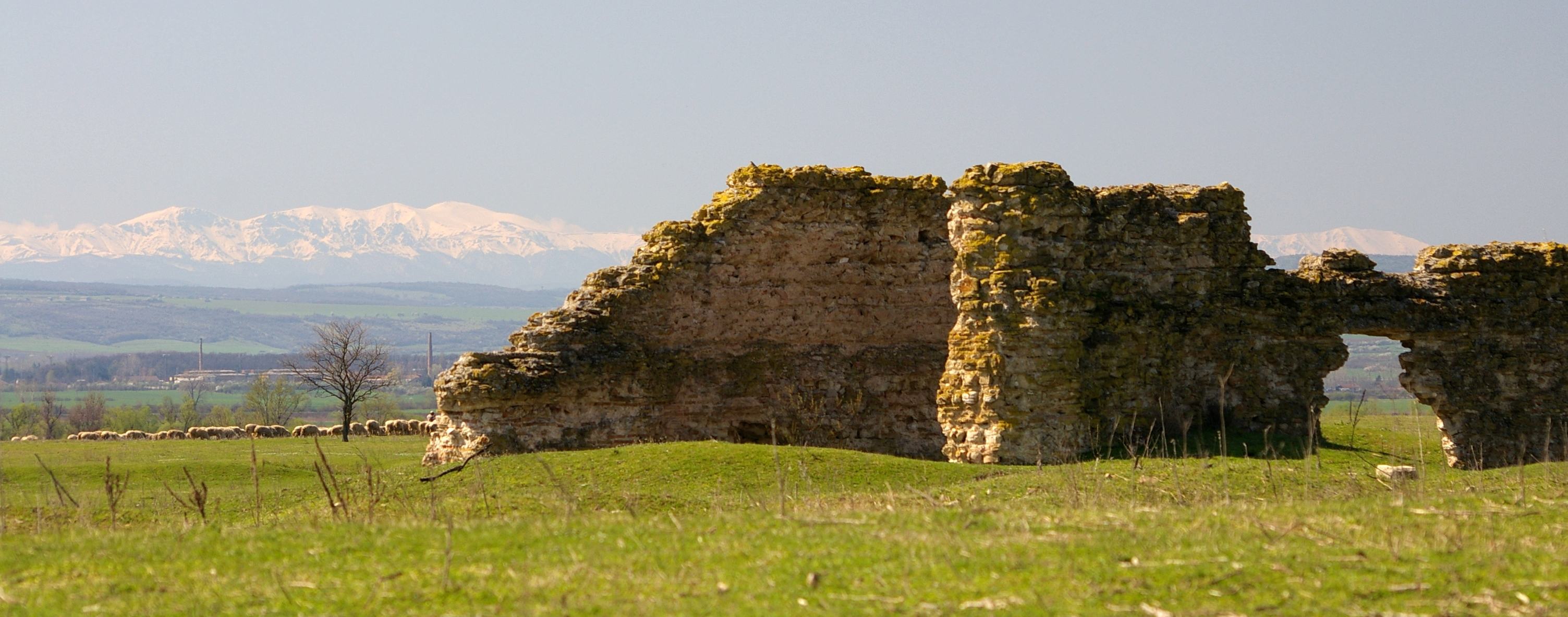 местоположение на запад от разкопаната част на града 43°13'03.7"N 25°36'22.3"E при по-късни разкопки към 2013 под руините се виждаха резервоари и тръби /канали